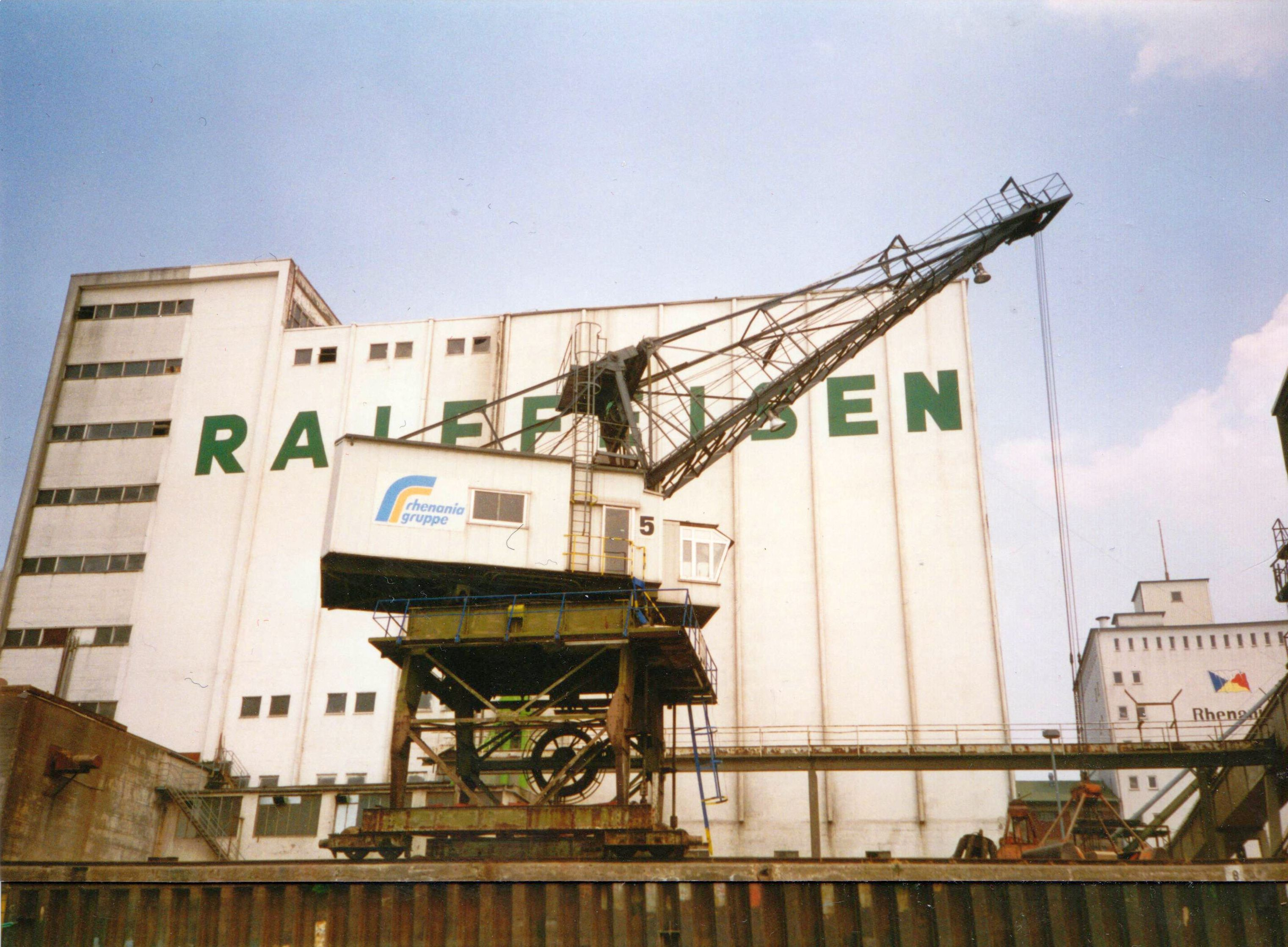 Krananlage Rhenania Gruppe im Hafen Wesel 1995 / Heute Rhenus im Hafen Wesel